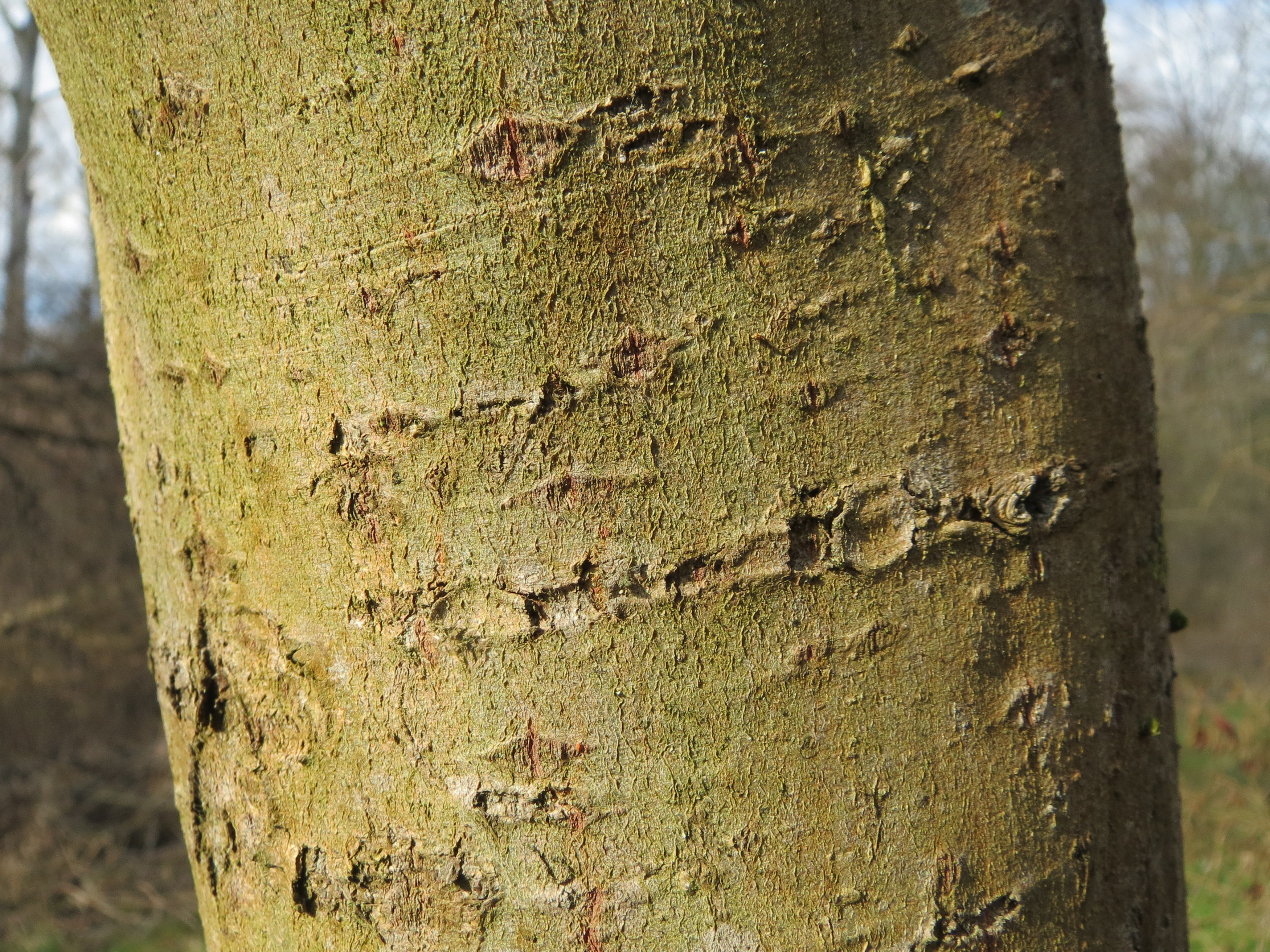 Asch-Weide (Salix cinerea) im Hockenheimer Rheinbogen